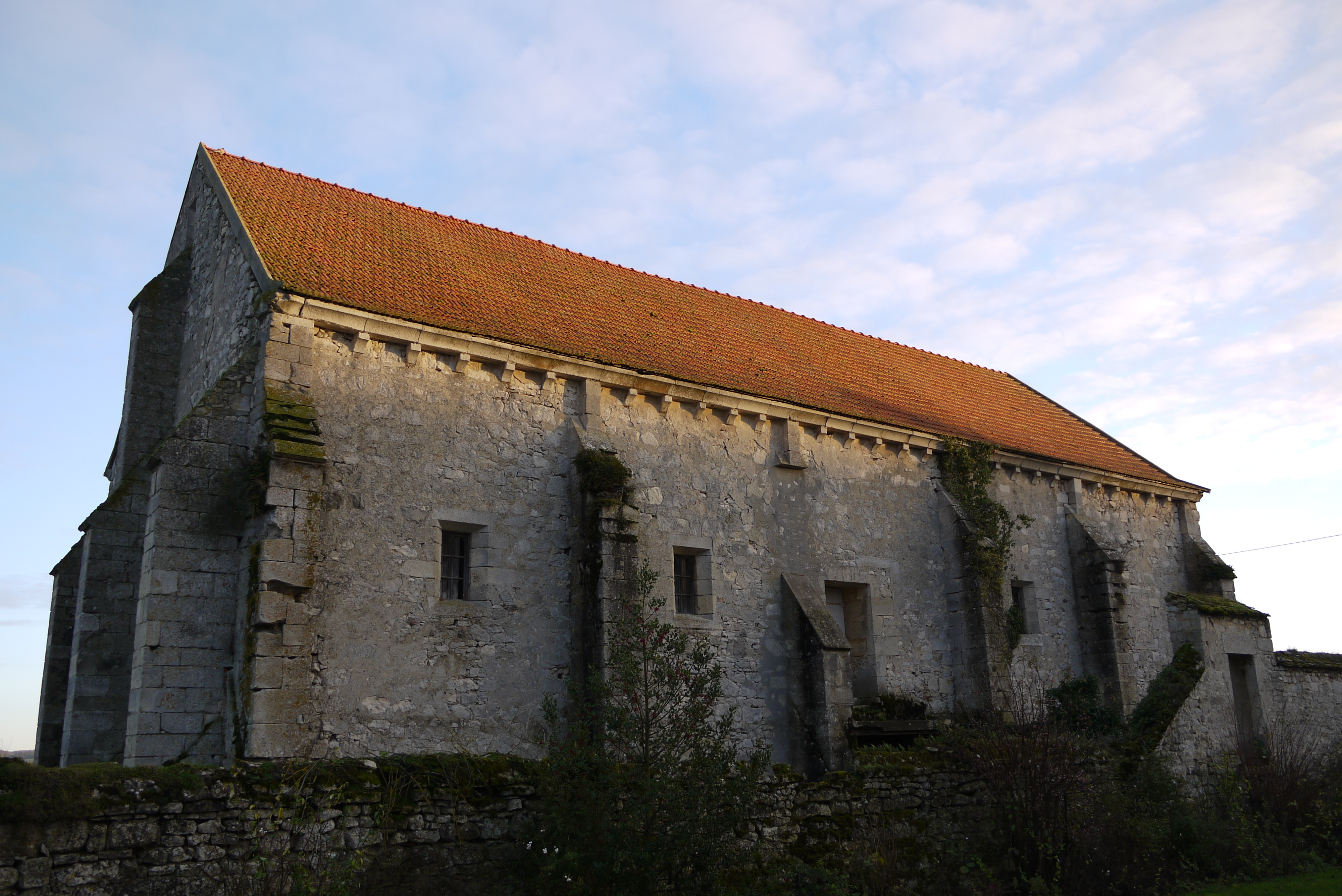 Grange de Montaon, à Dravégny.